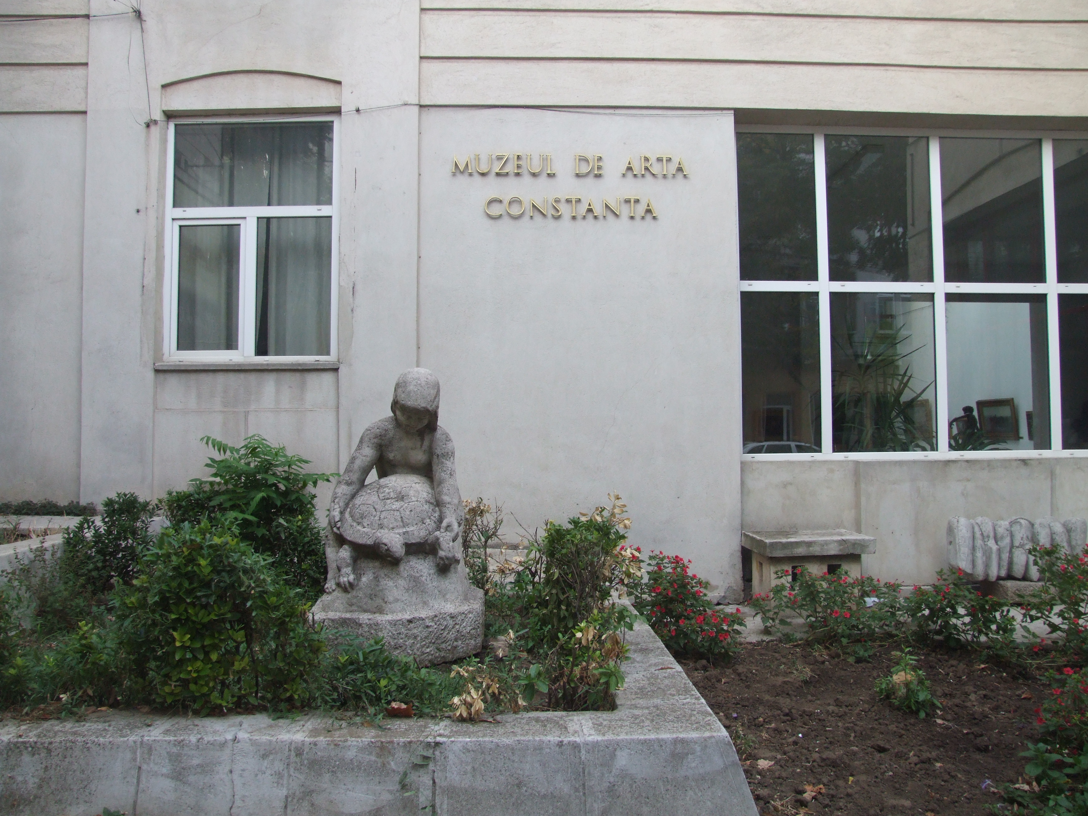 STATUIA " COPILUL CU BROASCA " , oras CONSTANTA, ROMANIA